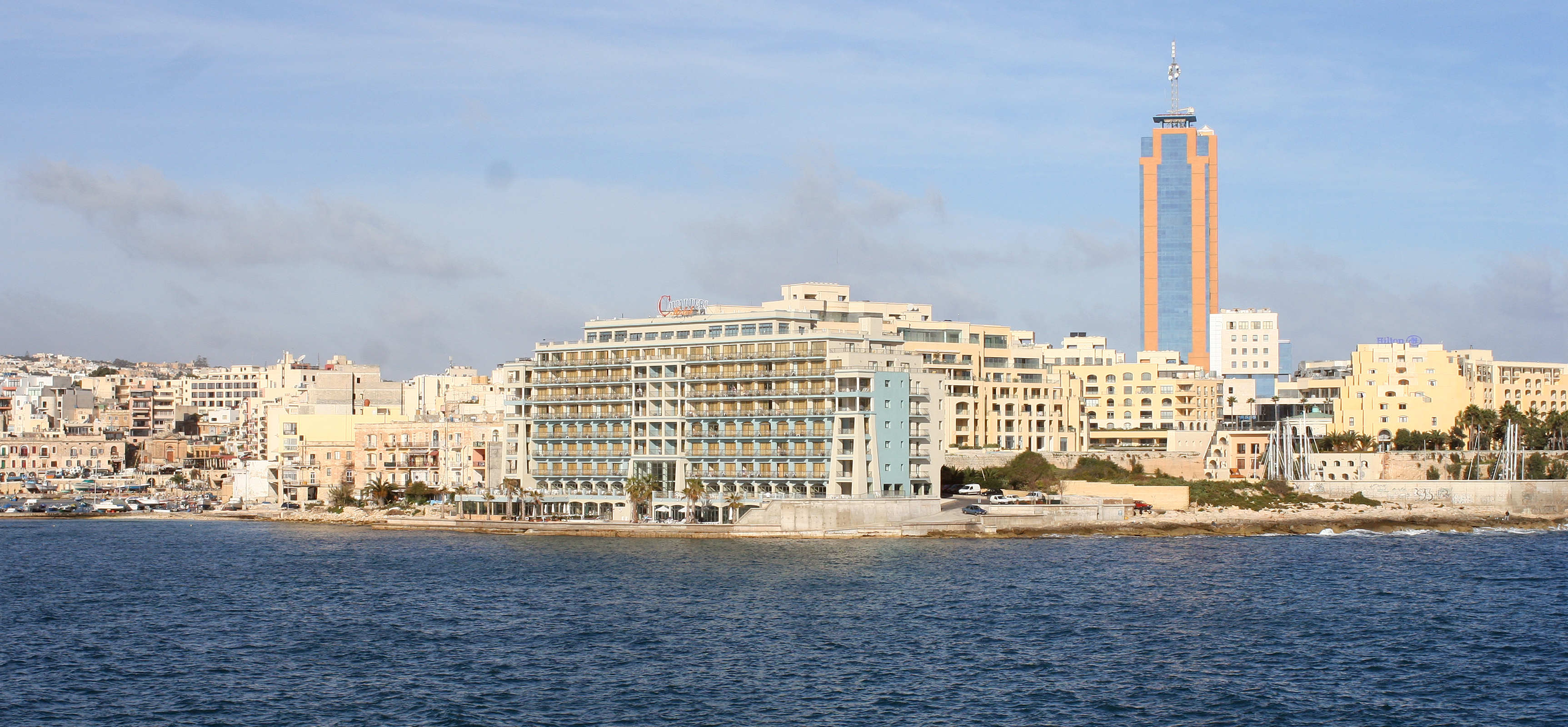 Malta, St. Julian's, hotels